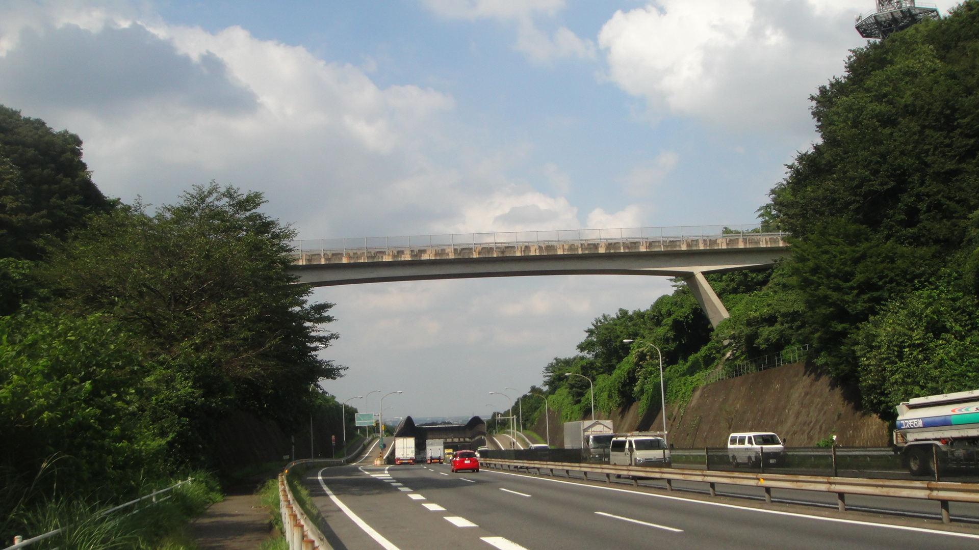 八王子市鑓水 八王子バイパス場にある跨道橋。